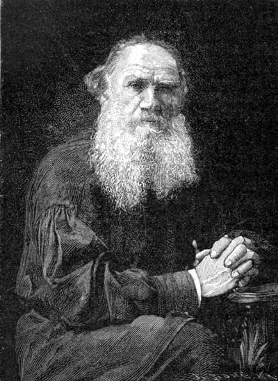 Lew Nikolajewitsch Tolstoi Original caption: :Leo Tolstoj :Nach einer Photographie